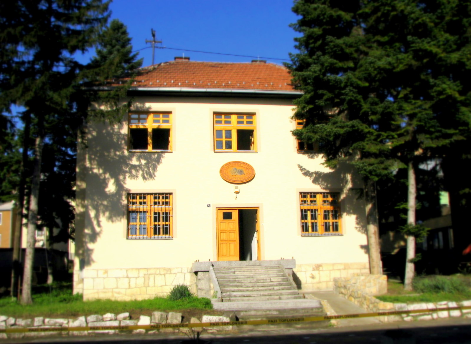 Музеј у Добоју Аутор: Бранко Д. Тодоровић